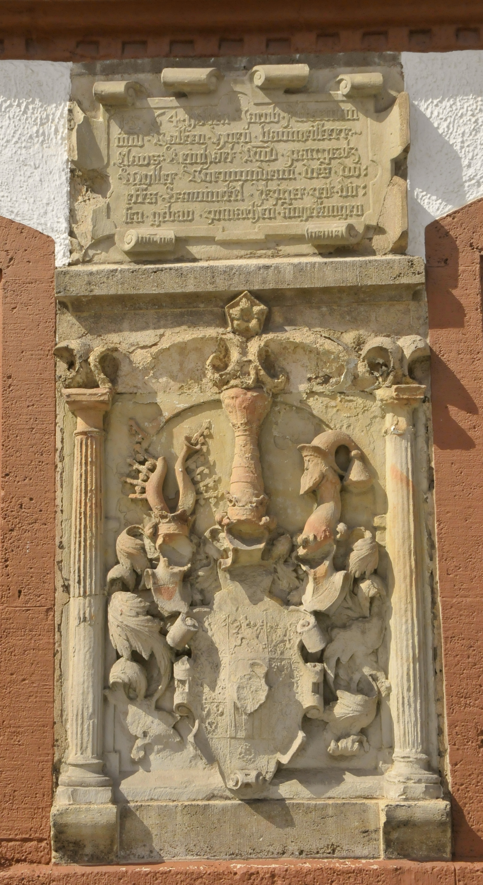 Crawinkel, Gemeindeschenke